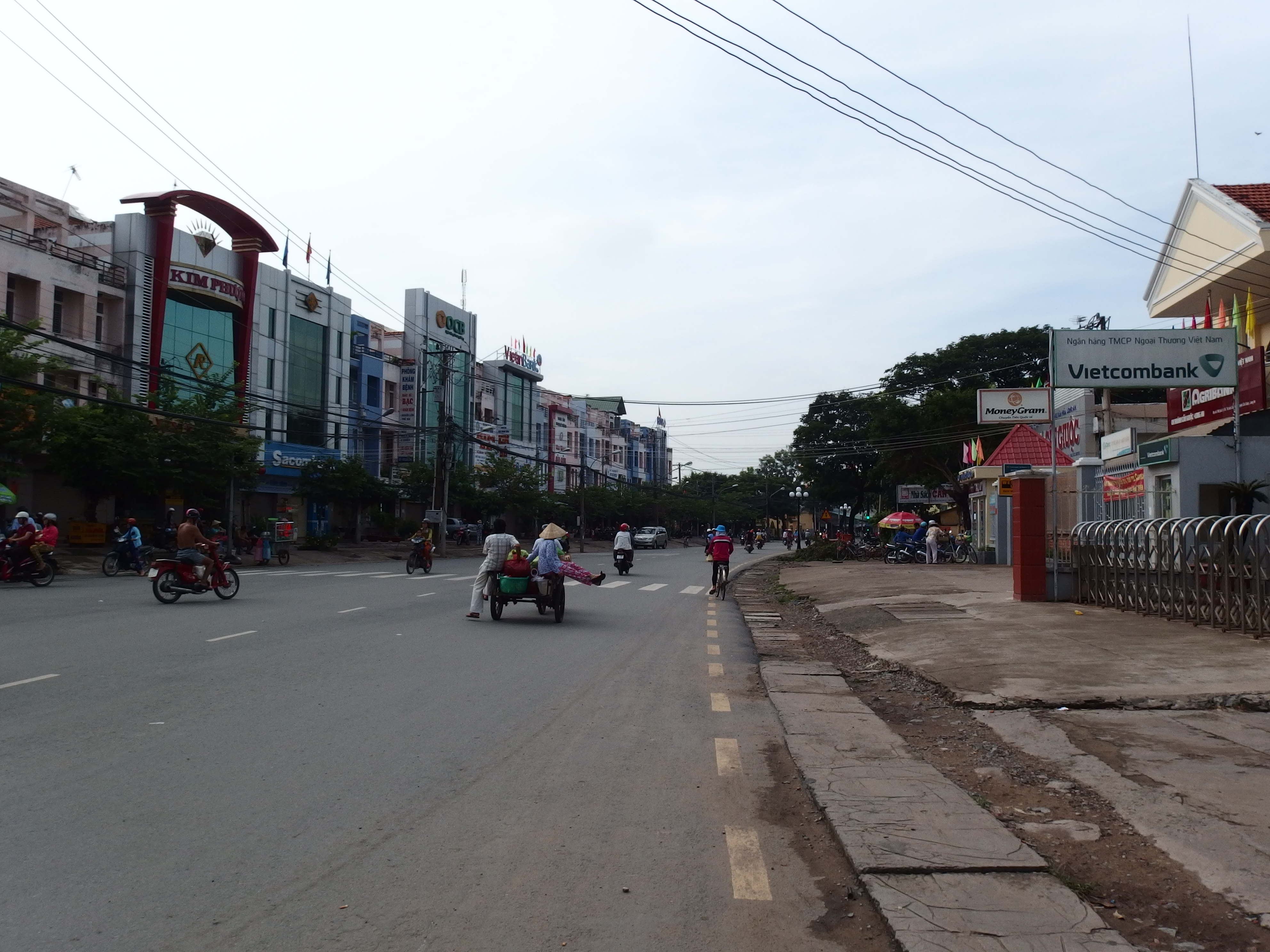 tt. Cần Giuộc, Cần Giuộc, Long An, Vietnam